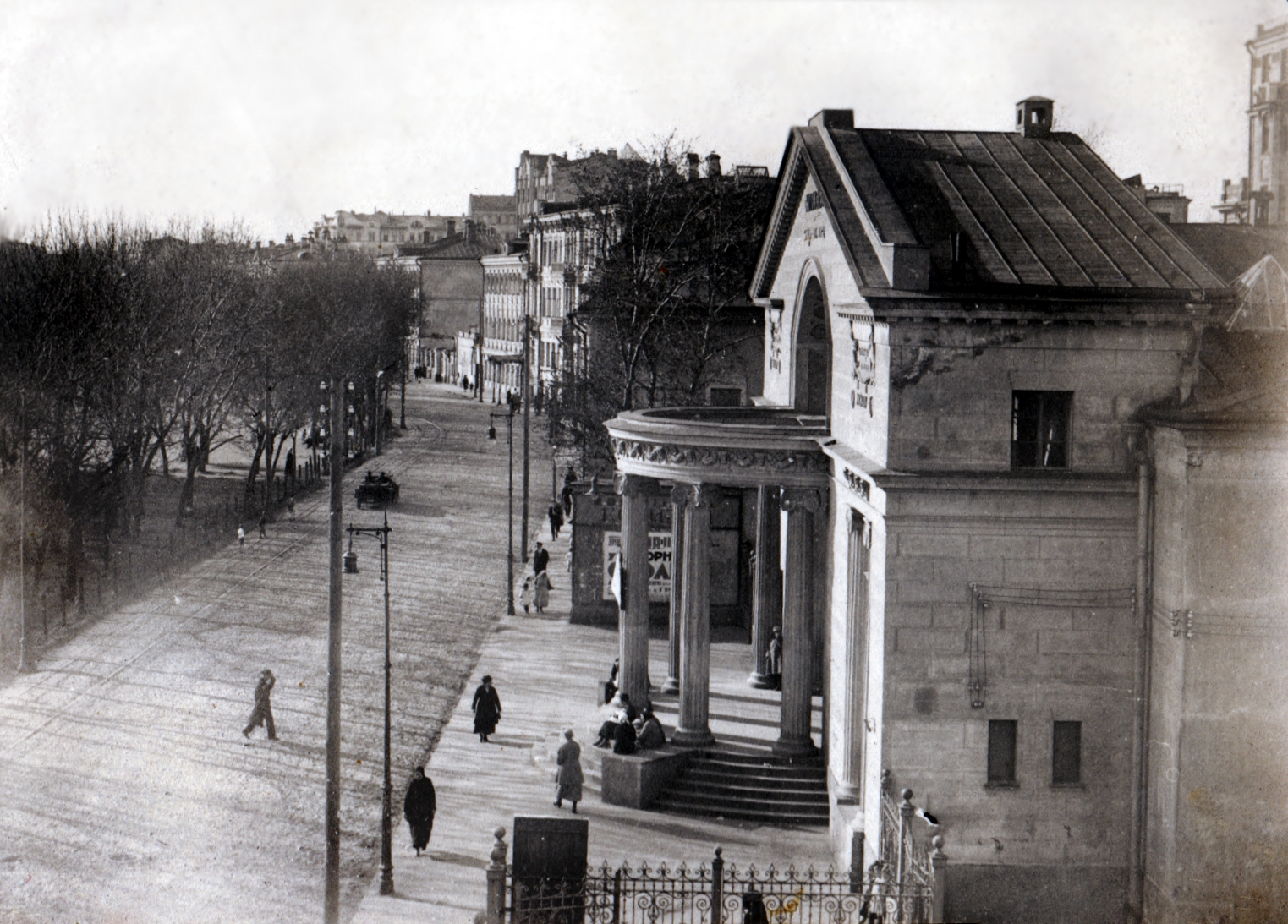 Кинотеатр Колизей